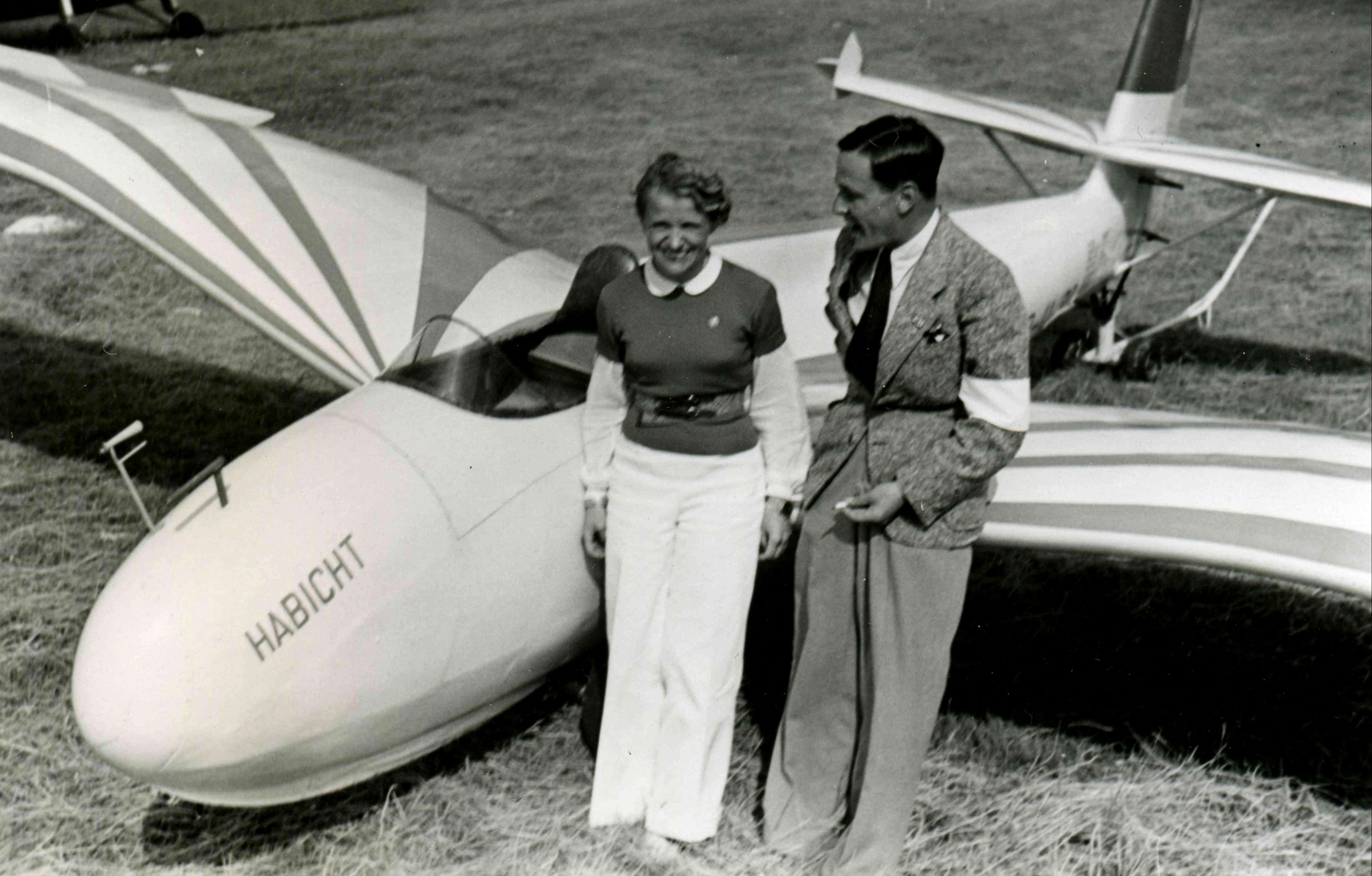 Foto anlässlich eines Großflugtages in Kassel-Waldau am 17. Juli 1938, der vom Fieseler Flugzeugbau Kassel maßgebend gestaltet wurde. Teilnehmer: Hanna Reitsch und der Fieseler Mitarbeiter Flugkapitän Knoetsch vor dem DFS Habicht. Mit diesem ersten vollkunstflugtauglichen Segelflugzeug begeisterte sie das Publikum auf vielen Flugtagen vor dem Zweiten Weltkrieg.